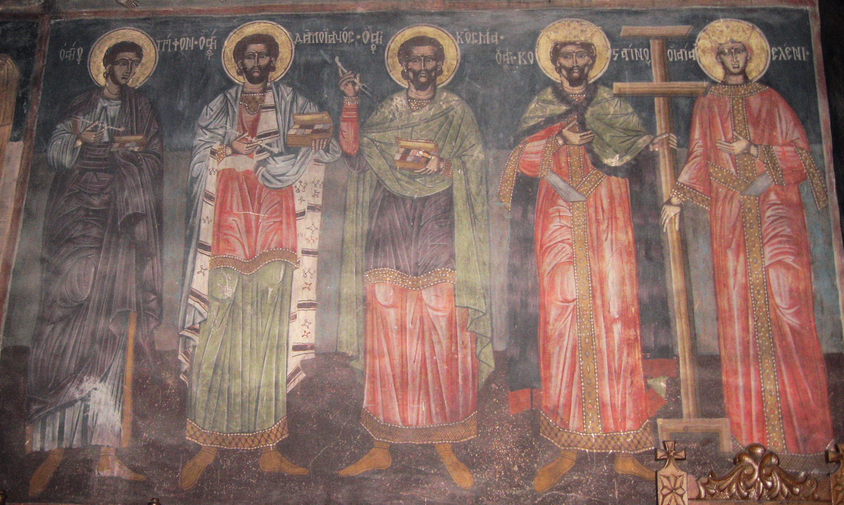 Fresca de la Mănăstirea Hlincea